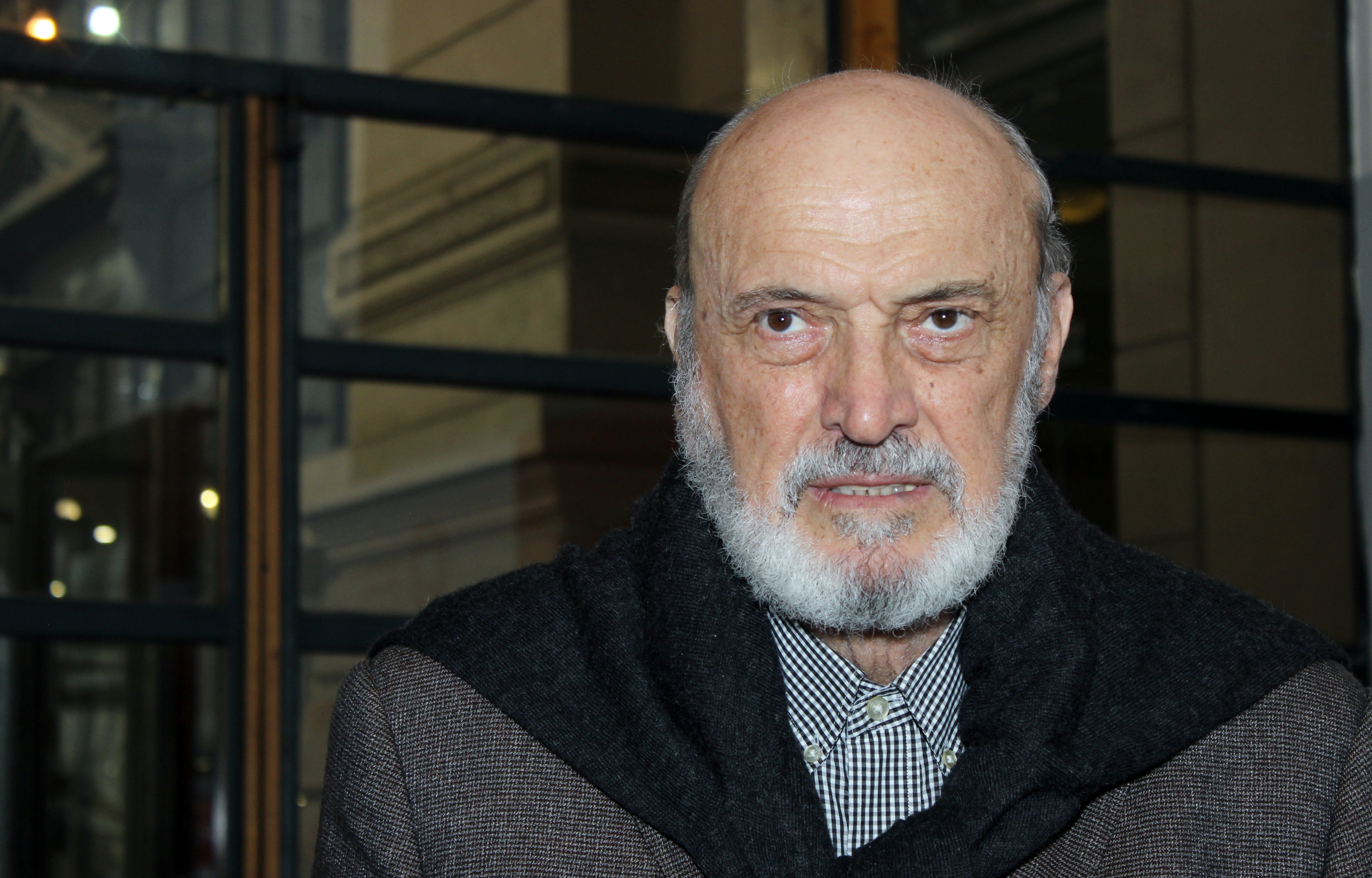 El escritor peruano Fernando Ampuero en la Feria Internacional del Libro de Santiago 2018.